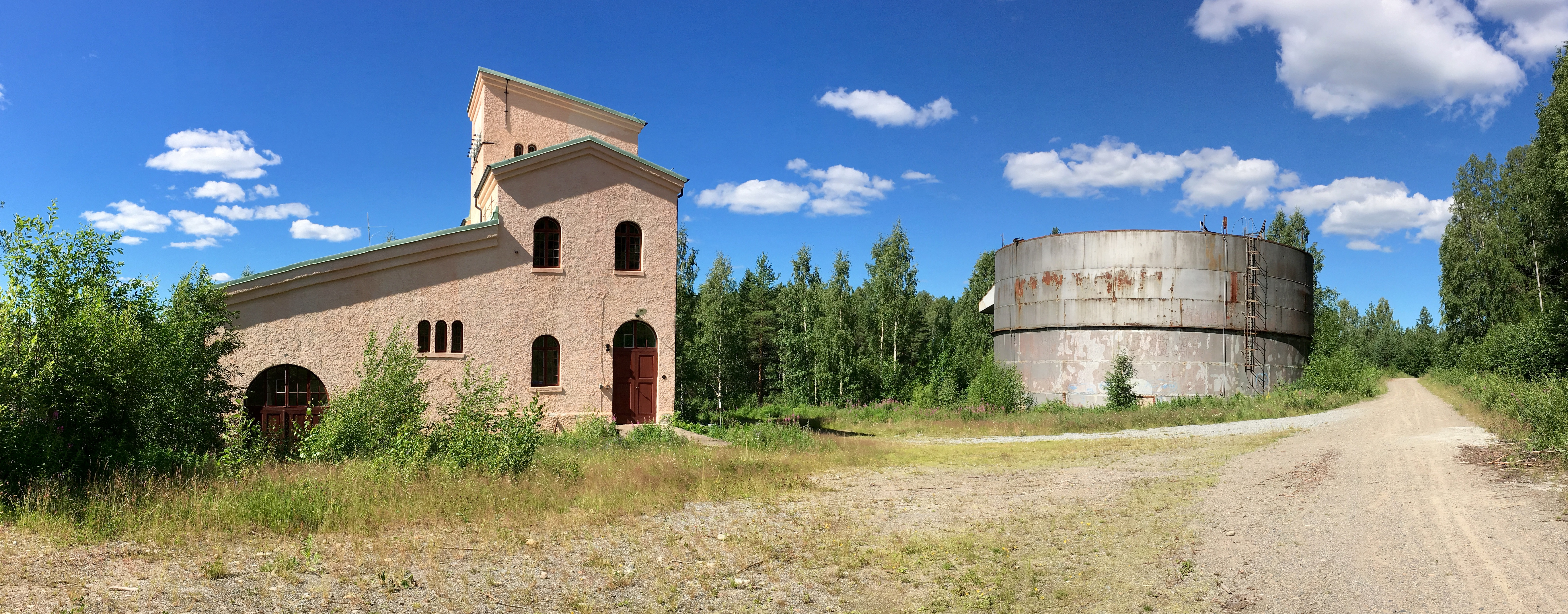 Sikfors gamla kraftstation, uppförd 1911-1912 och belägen efter Piteälven i byn Sikfors, Piteå kommun. Kraftstationen togs ur bruk 1990. Fallhöjden uppgick till 16 meter och effekten till 6MW. Uppförd i byggnadstegel samt för den tiden helt modern armerad betong och med putsad fasad. Till höger om kraftstationen syns svalltornet.